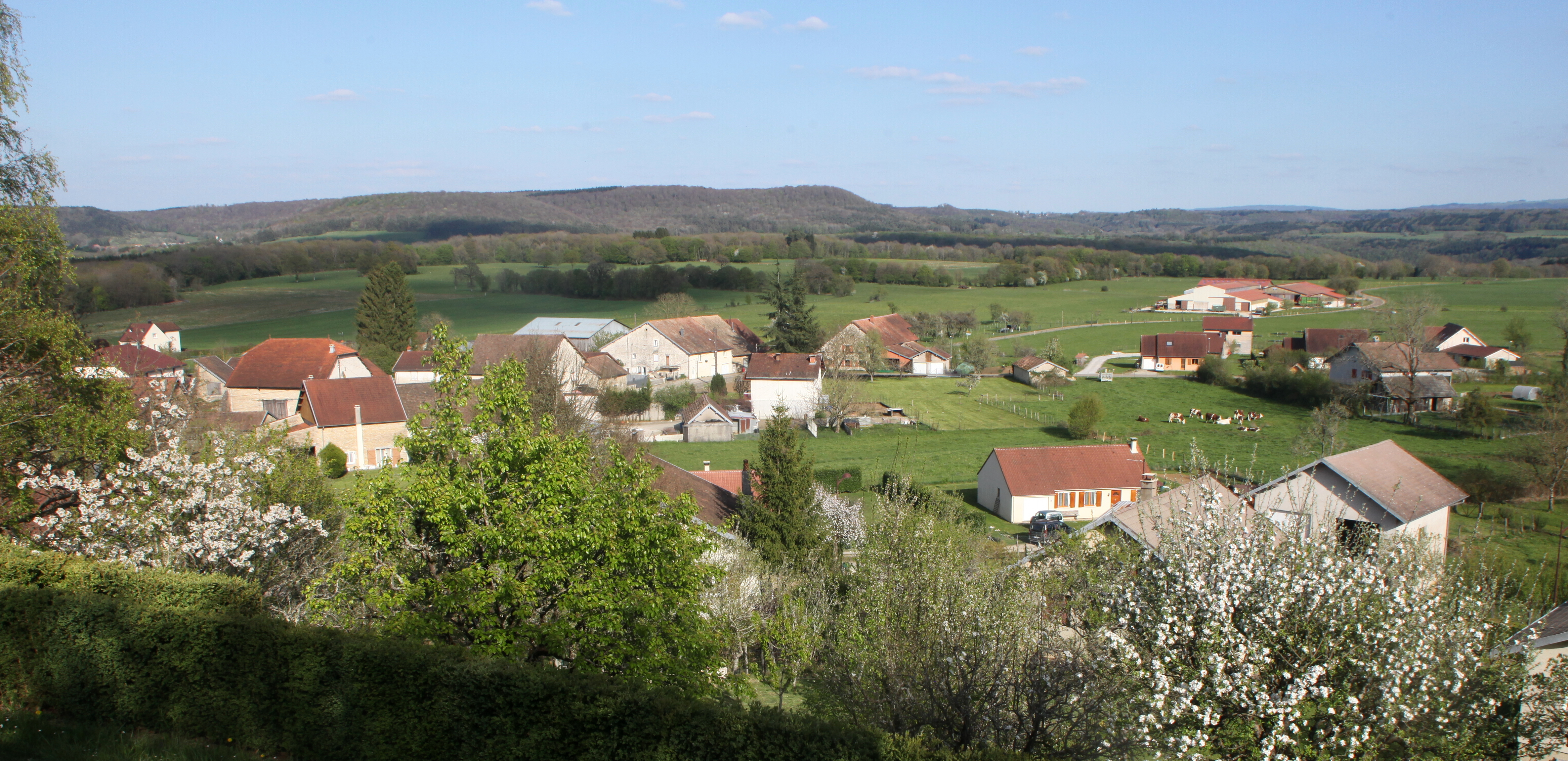 Vue de Rouhe (Doubs).